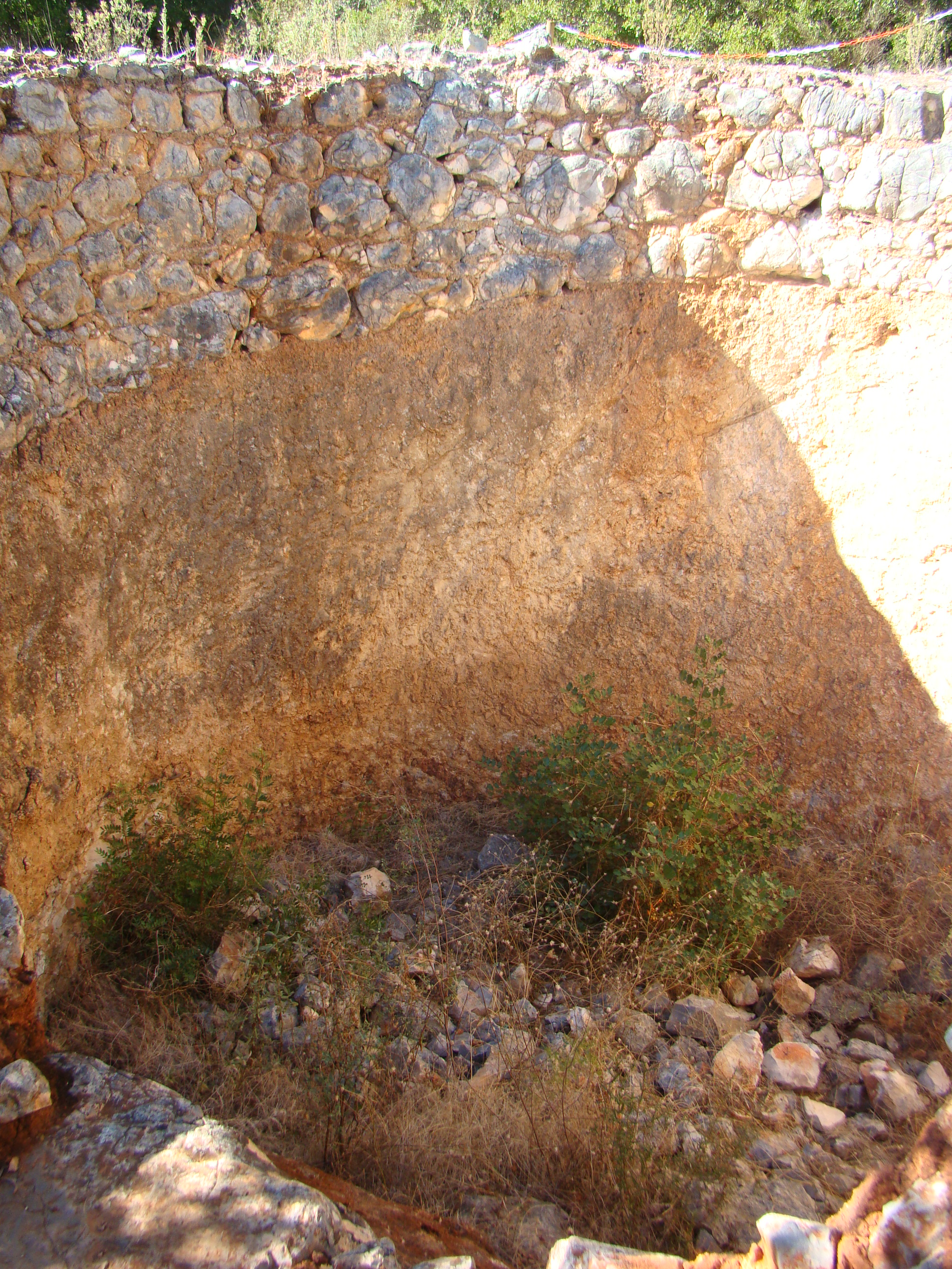 Centro de Alcalar 2017 - Forno de cal 2